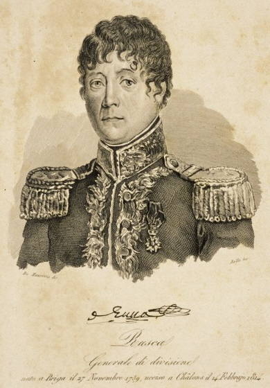 Ritratto del generale Giovanni Battista Rusca (1759-1814)